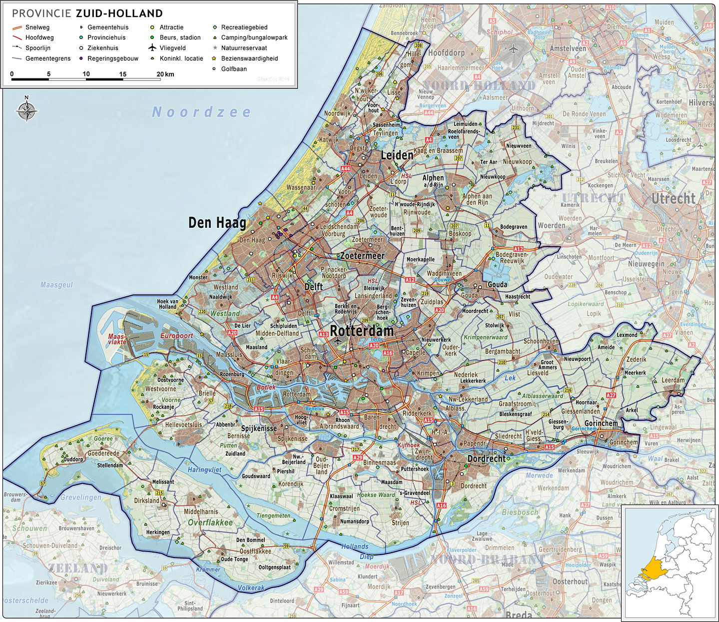 Provincie Zuid-Holland, met indeling van gemeenten (2011) en impressie van het landschap. Door Jan-Willem van Aalst, samengesteld uit publiek beschikbare geo-data: Referentie-ondergrond (kustlijn, steden, wegen) gerasterd uit de OpenStreet Map OSM. ( Inhoud is beschikbaar onder de Creative Commons Attribution-ShareAlike 3.0 license. Referentie-ondergrond op water bewerkt vanuit Gebruik is vrij met bronvermelding NLR en ESA. Vectorgrenzen van gemeenten en regio's vrij ter beschikking gesteld met dank aan cartografen van brandweerregio's Hollands-Midden en IJsselland; gerasterd in Photoshop. Hoogte-aanduidingen (reliëf) gerasterd uit de AHN Viewer ( gebruik is vrij met bronvermelding (c) AHN, Locaties verblijfsrecreatie (campings) op basis van Borisweb ( van Kenniscentrum recreatie. Gebruik is vrij, met bronvermelding. Overige kenmerken op de kaart: eigen tekenwerk van Jan-Willem van Aalst, op basis van gerasterde gemeentegrenzen.